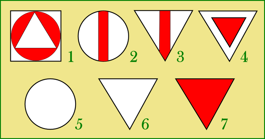 Znaki taktyczne na czołgach rozpoznawczych i lekkich stosowane w II RP: 1 - czołg dowódcy szwadronu (kompanii); 2 - czołg dowódcy 1 plutonu; 3 - czołg dowódcy 2 plutonu; 4 - czołg dowódcy 3 plutonu; 5 - czołgi z 1 plutonu; 6 - czołgi z 2 plutonu; 7 - czołgi z 3 plutonu.